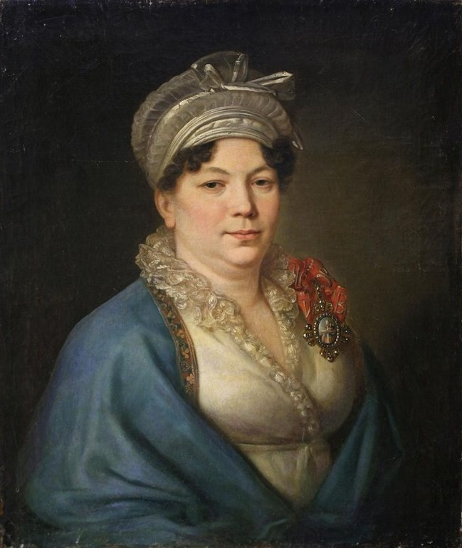 Анна Ивановна Коновницына, урождённая Корсакова (1769-1843) - супруга генерала П.П. Коновницына, мать декабристов Петра и Ивана Коновницыных, Е.П. Нарышкиной